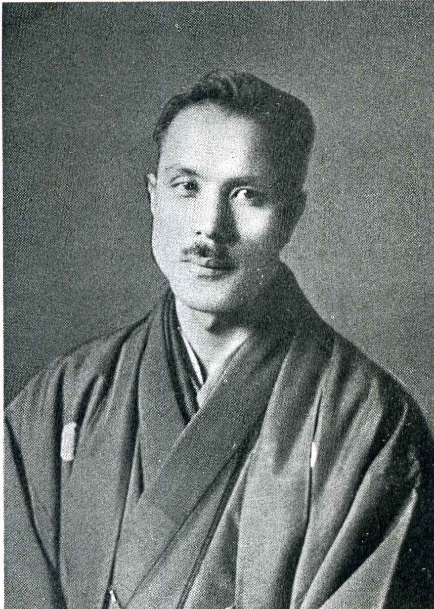 この写真は、深沢豊太郎（1895-1944）の写真です。